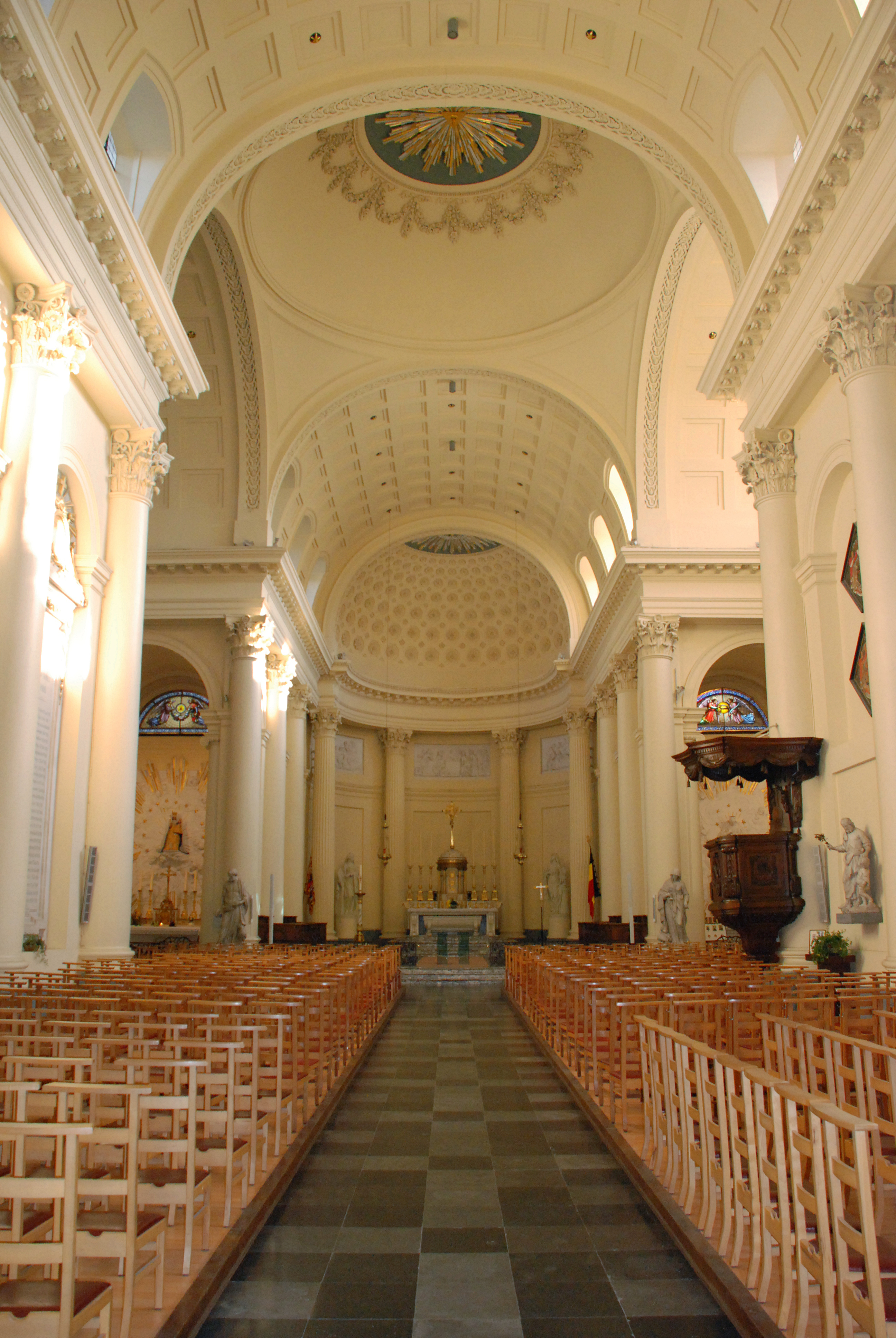 Belgique - Bruxelles - Église Saint-Jacques-sur-Coudenberg